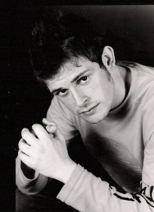 L'attore italiano Lorenzo Branchetti.